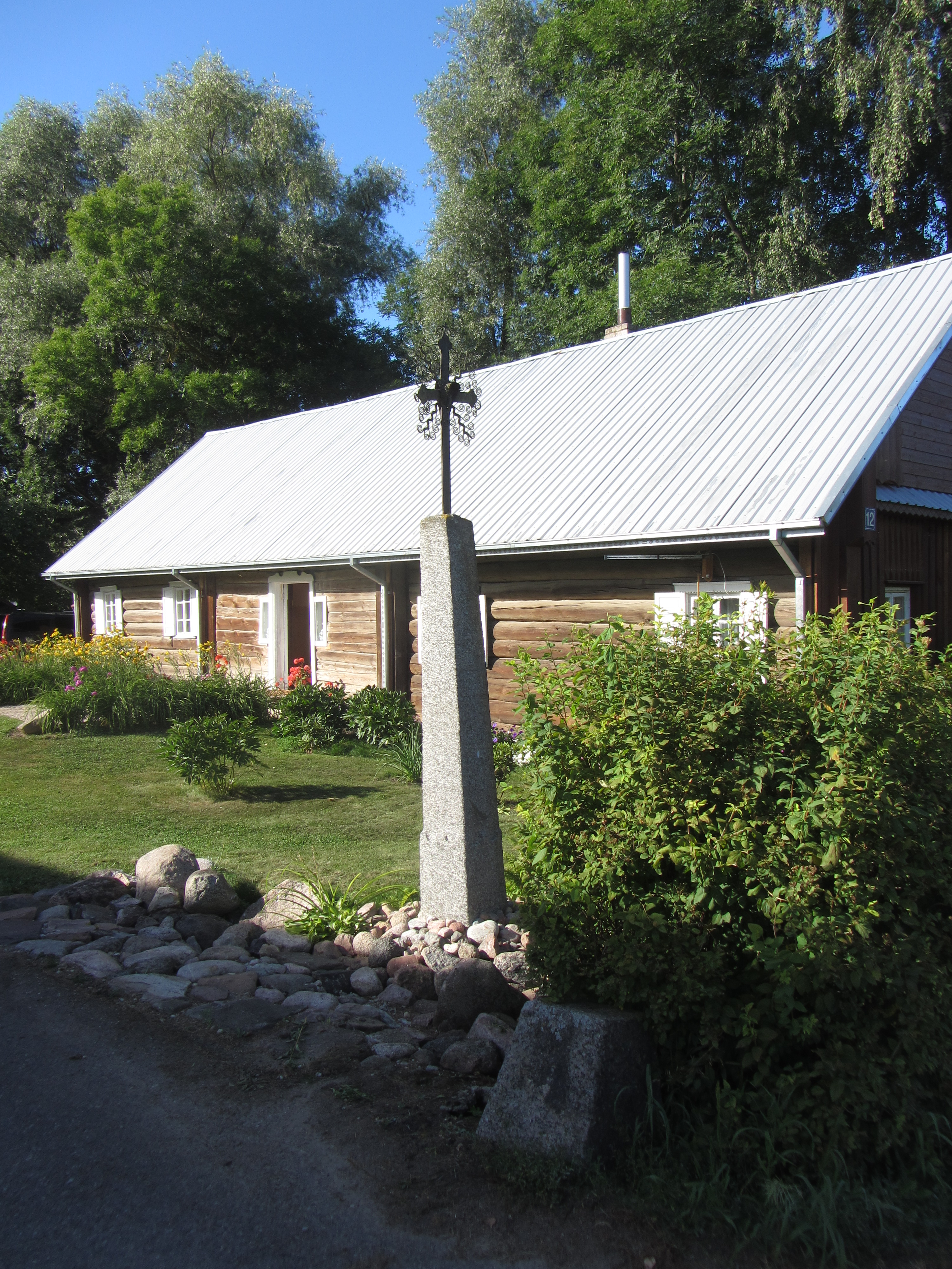 Kalviai, Lithuania